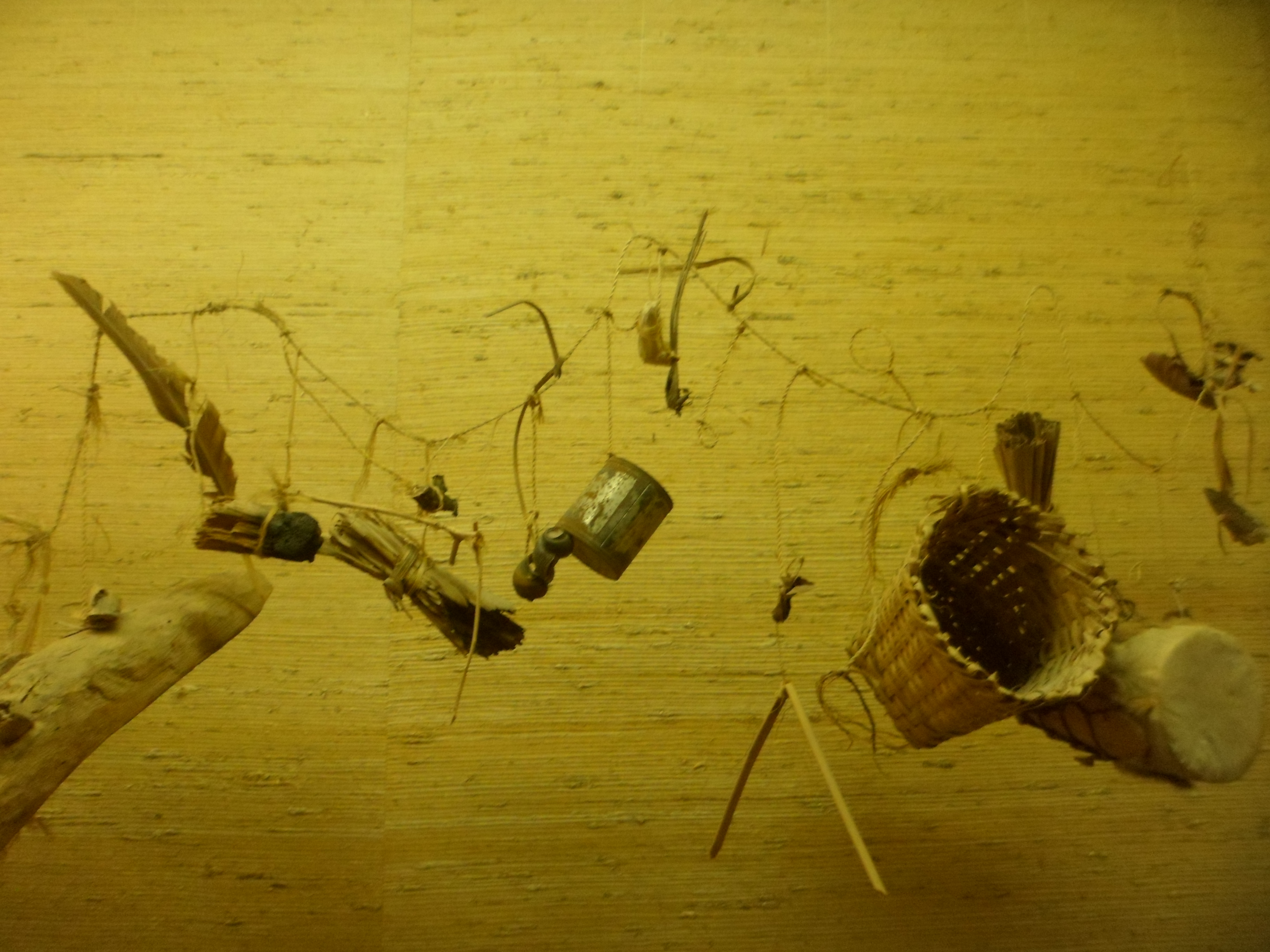 Musée royal d'Afrique centrale